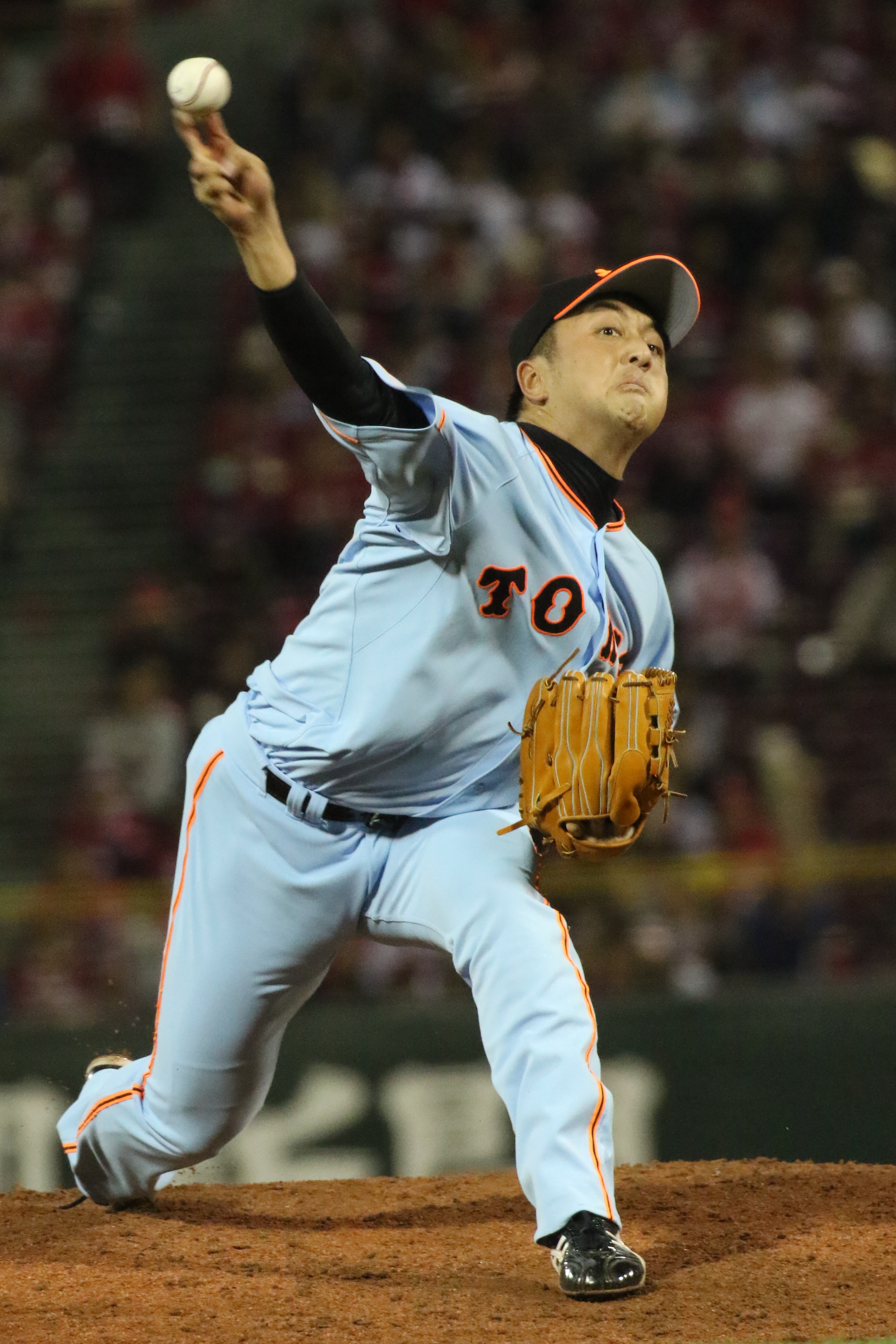 ジャイアンツ澤村選手